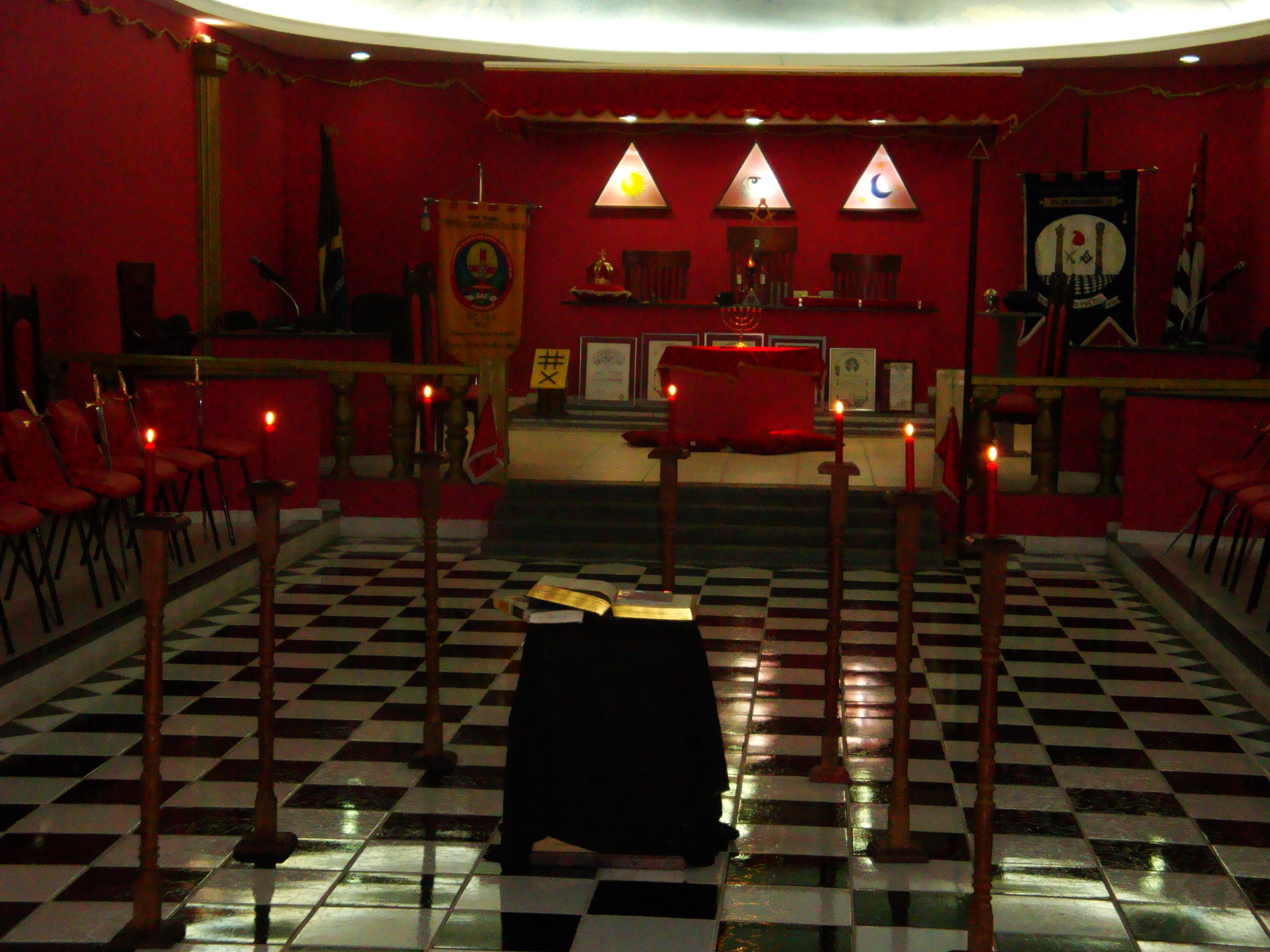 Vista interior do Capítulo DeMolay Cavaleiros da Luz, em Ribeirão Preto/SP